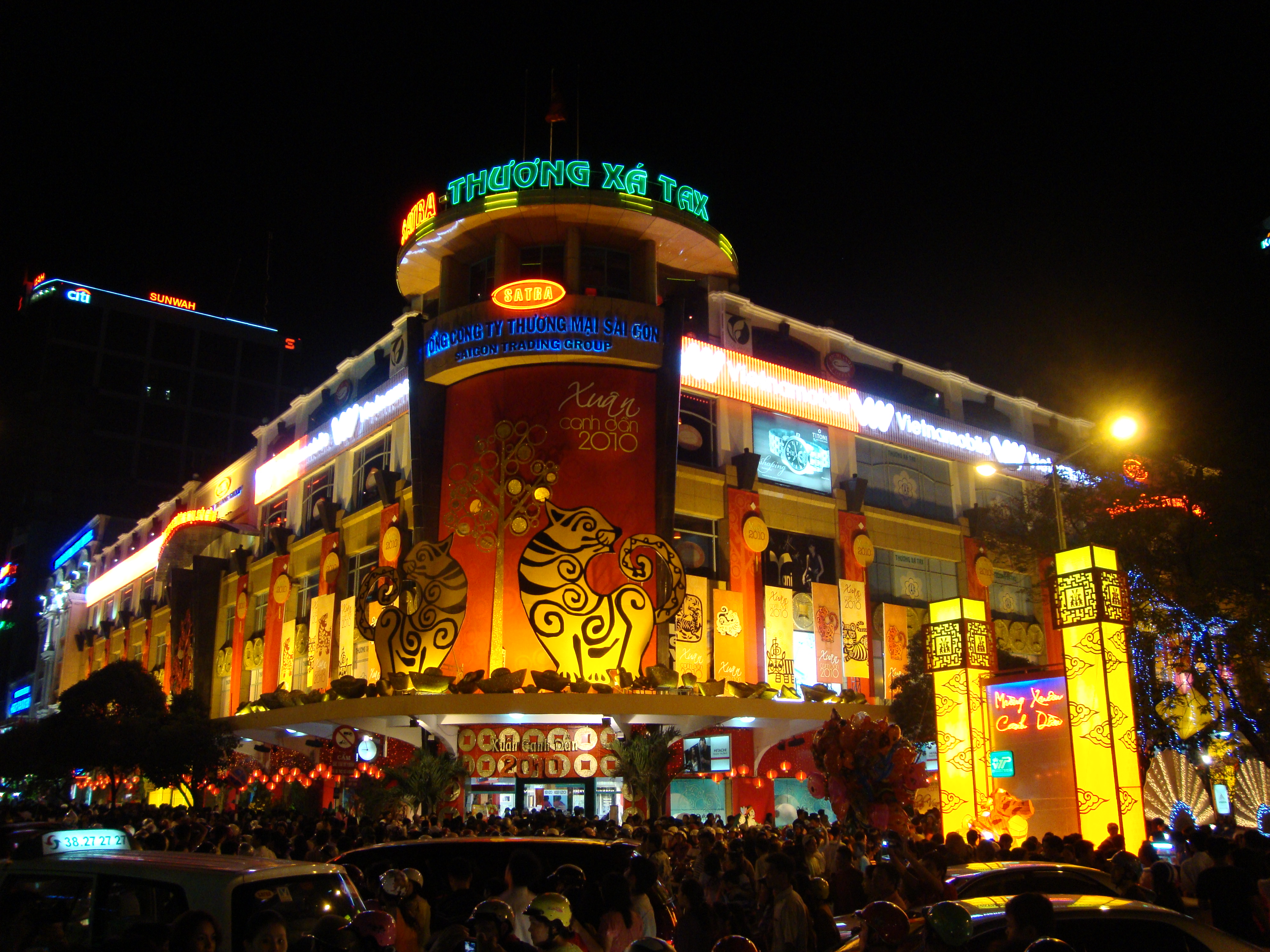 Trung tâm Thành phố Hồ Chí Minh